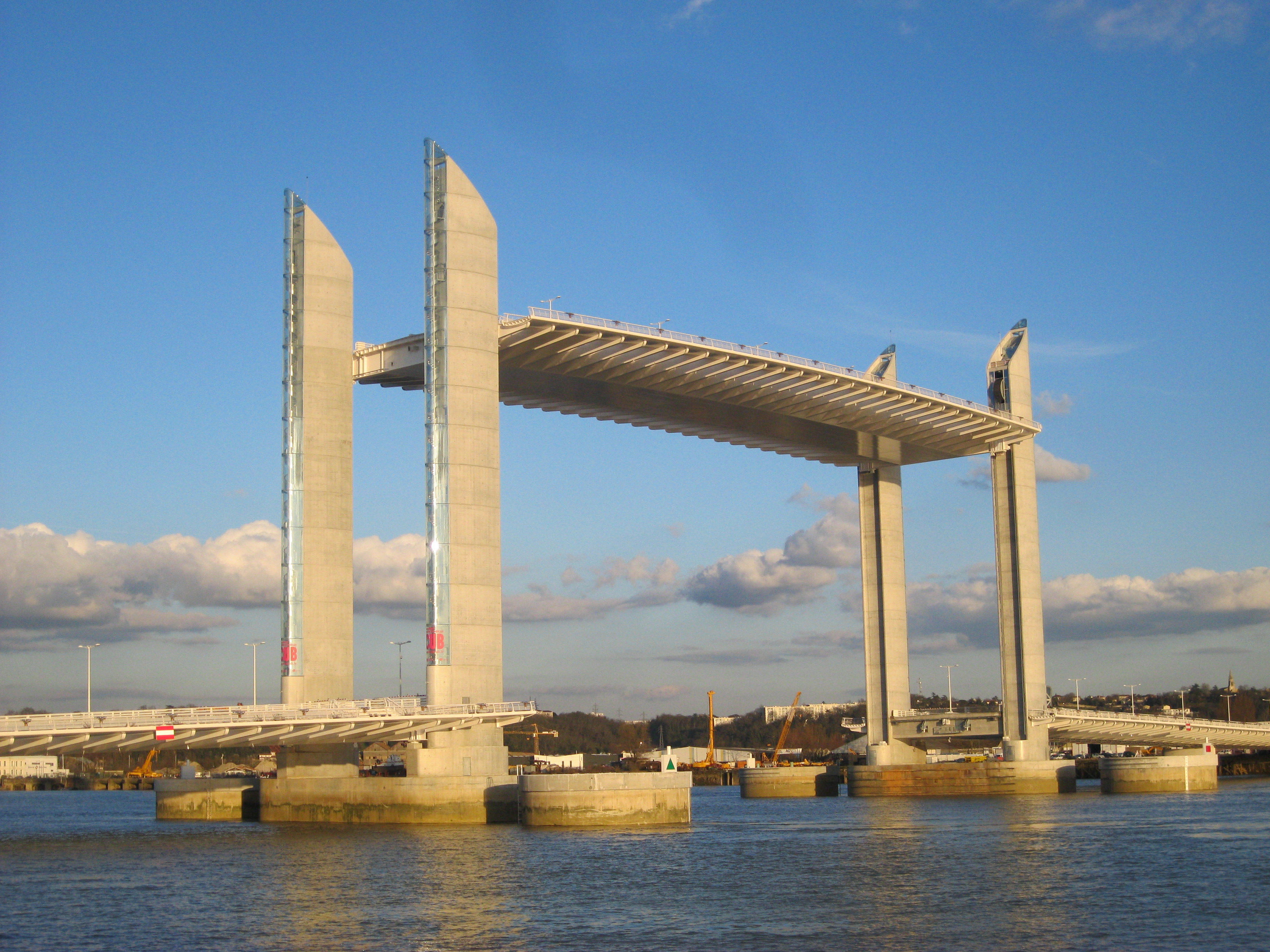 Le pont Jacques-Chaban-Delmas levé à Bordeaux, le 15 mars 2013 (jour de son inauguration).